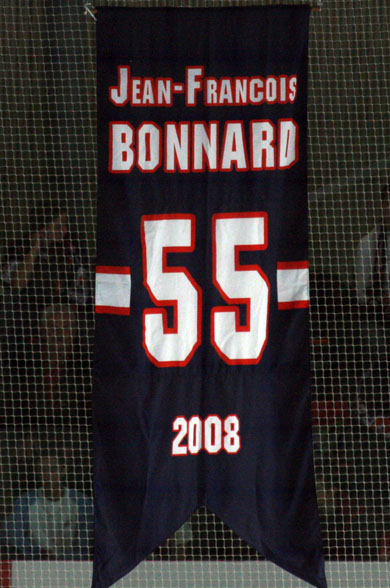 Le #55 de Jean-Francois Bonnard accroché dans la patinoire Pôle Sud